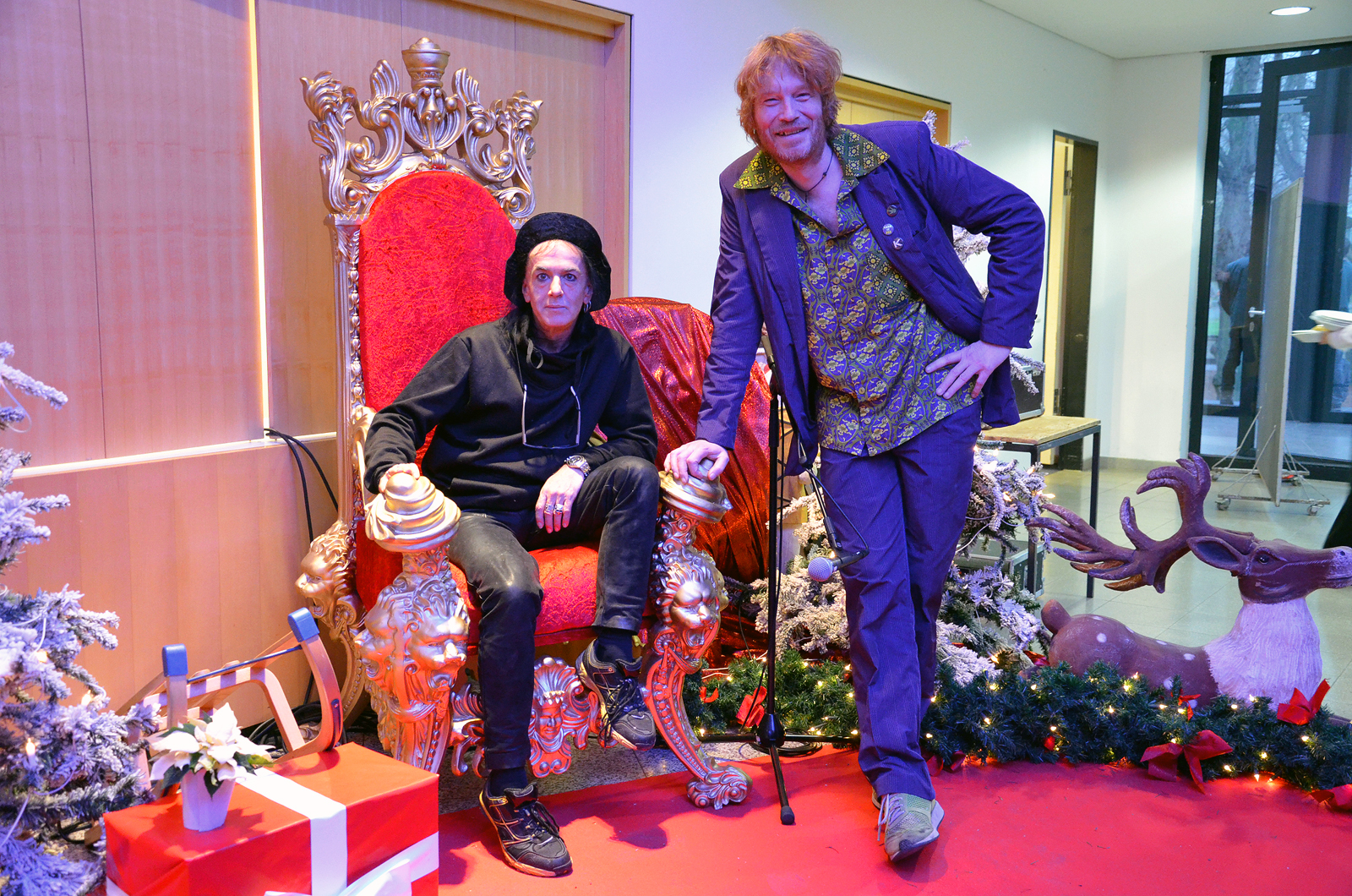 Auch „Die!!! Weihnachtsfeier für Obdachlose und Bedürftige in Hannover“ hatte der Gitarrist der hannoverschen Band Fury in the Slaughterhouse, Christof Stein-Schneider (rechts) wieder initiert und gesponsort. Hier ist er mit seinem Freund Ecki Stieg zu sehen, der auf dem Thron für den Weihnachtsmann sitzt, von dem aus die zahlreichen Kinder beschenkt werden sollen ...